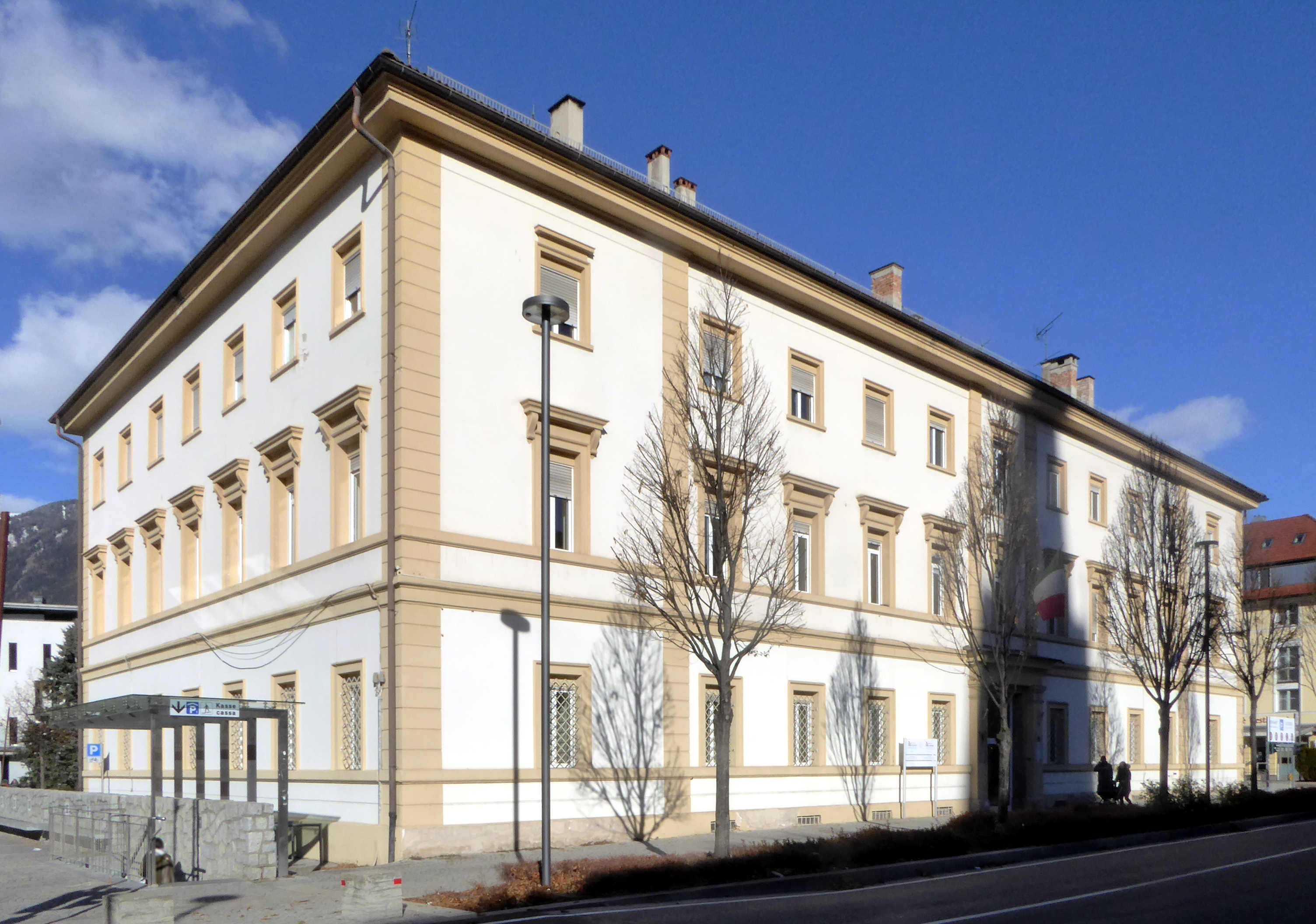 Bruneck (Südtirol), Steueramt (Agentur der Einnahmen) und Gerichtsgebäude, von Süden gesehen.